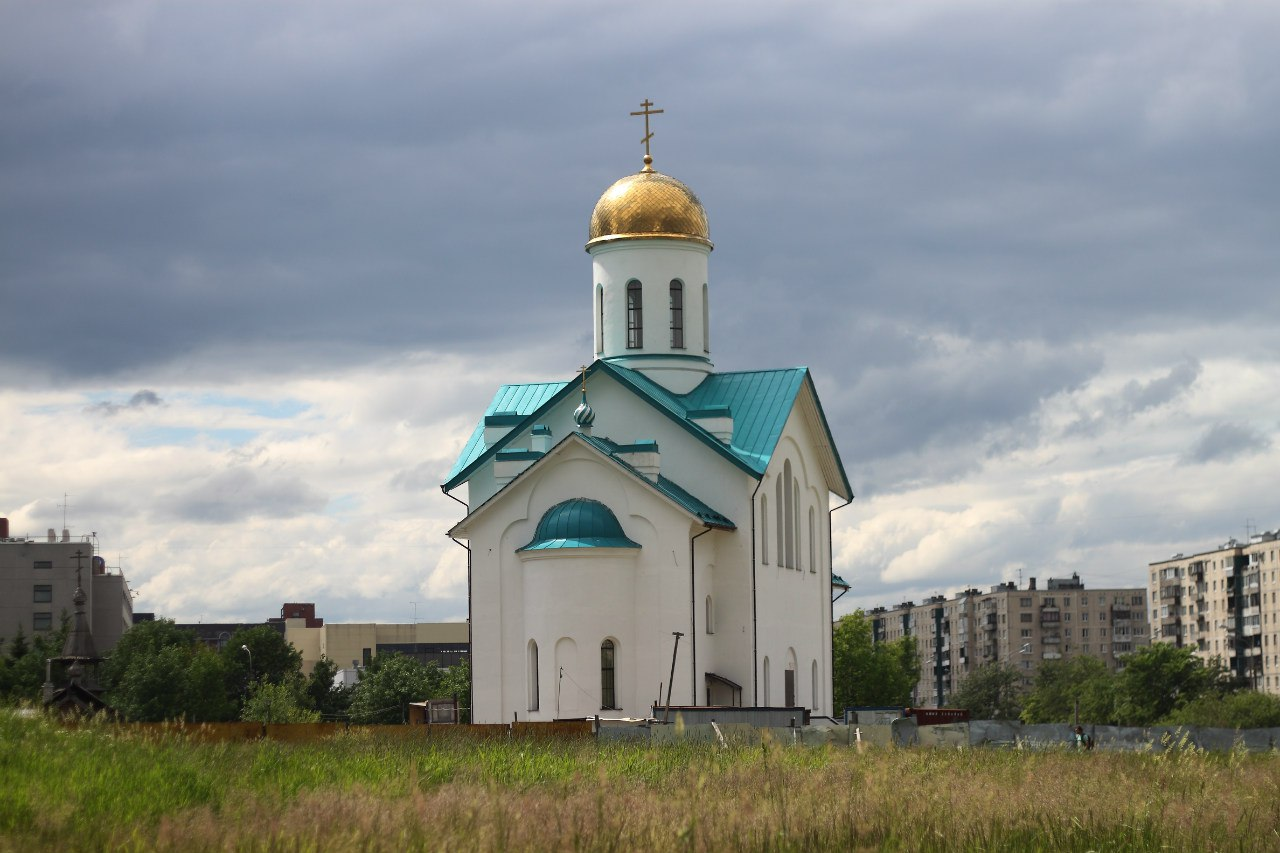 Orthodox church of St.Seraphim in Kupchino